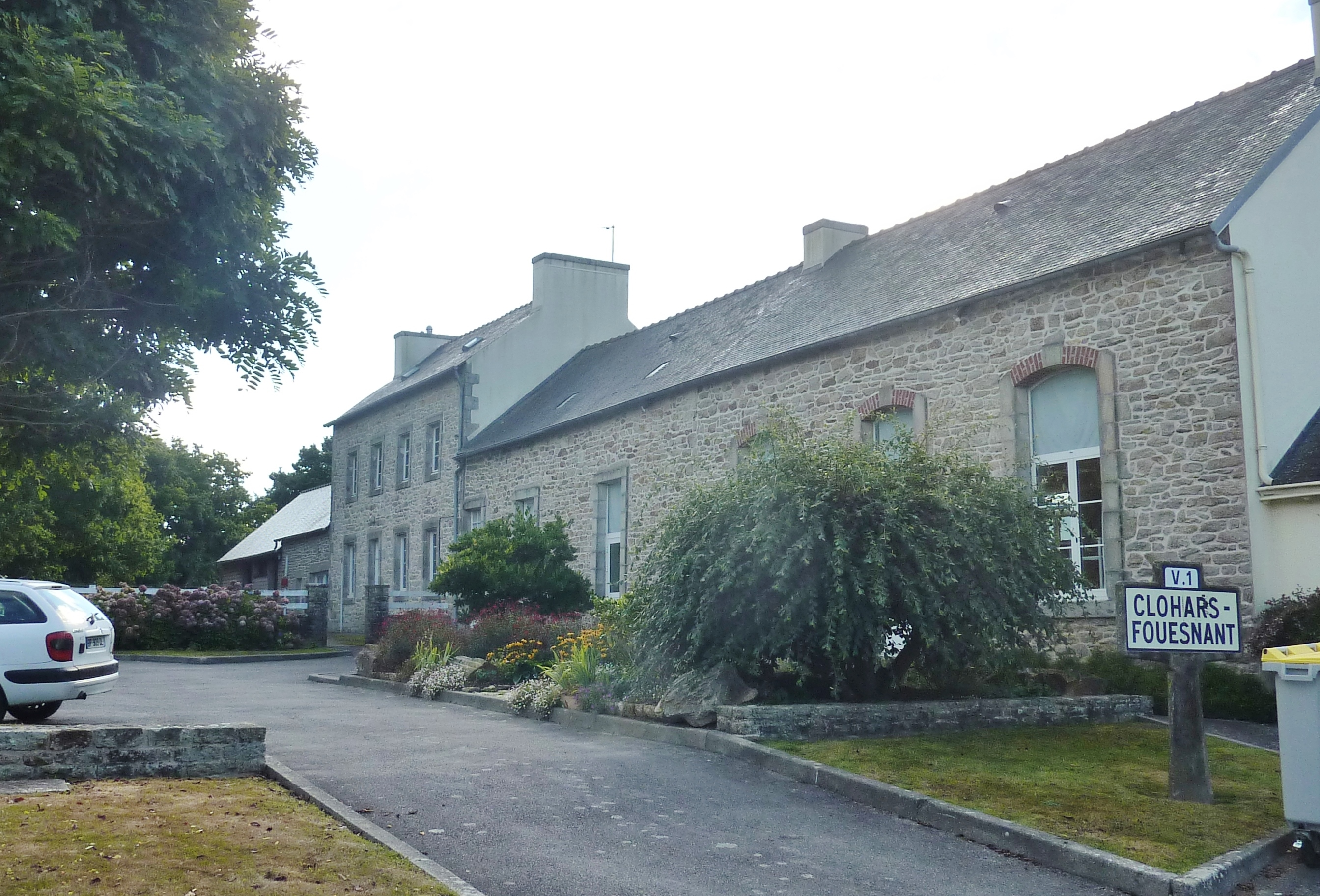 Clohars-Fouesnant : l'école publique